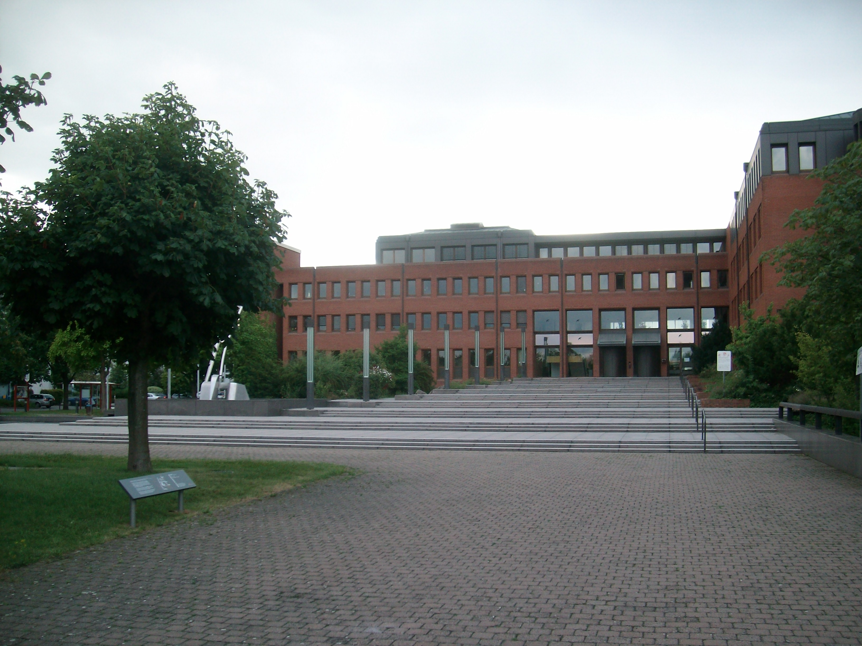 Hofheimer Kreishaus